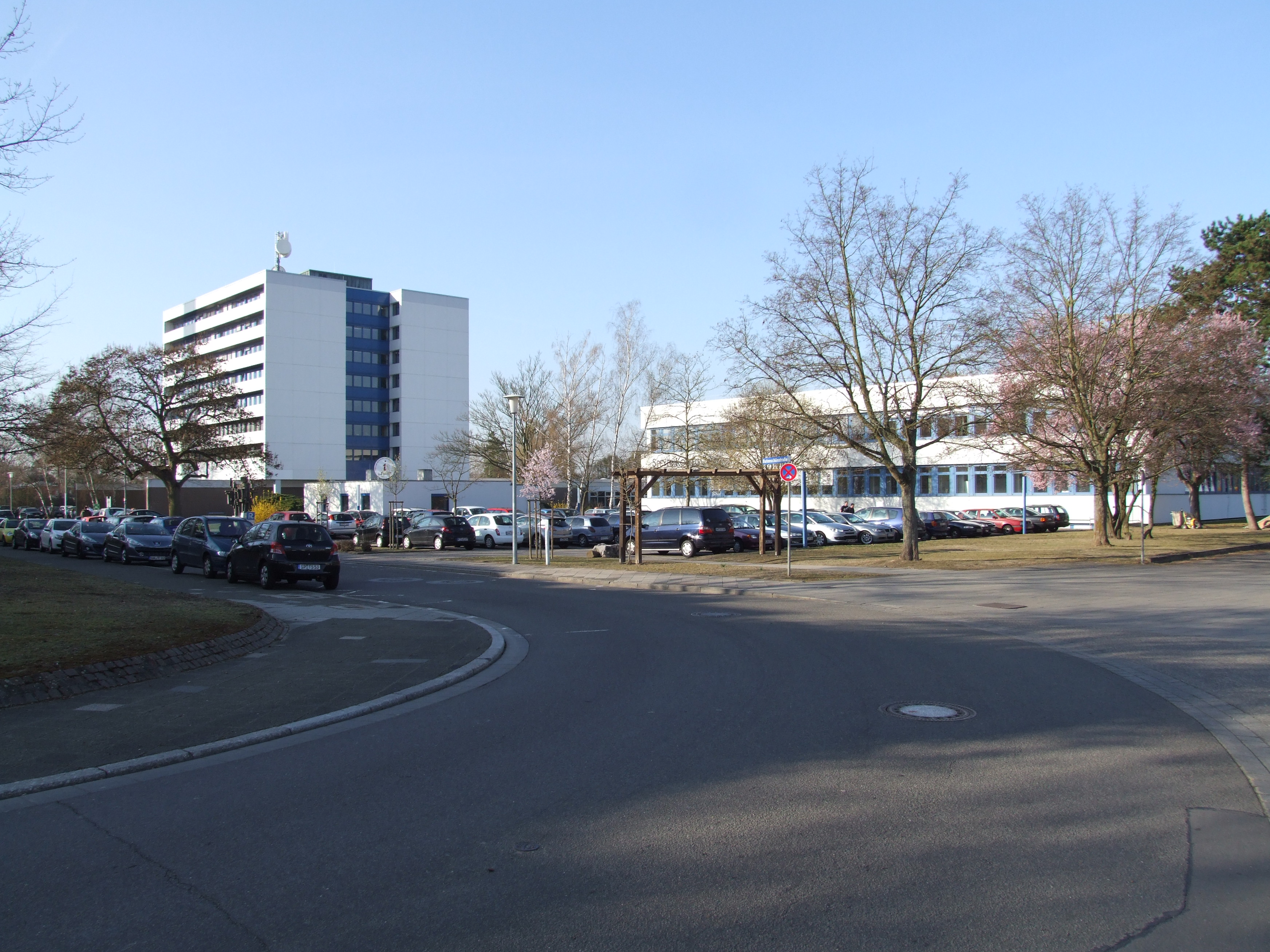 Pädagogisches Landesinstitut Rheinland-Pfalz Butenschönstr. 2, 67346 Speyer, Hauptsitz im Hochhaus links im Bild